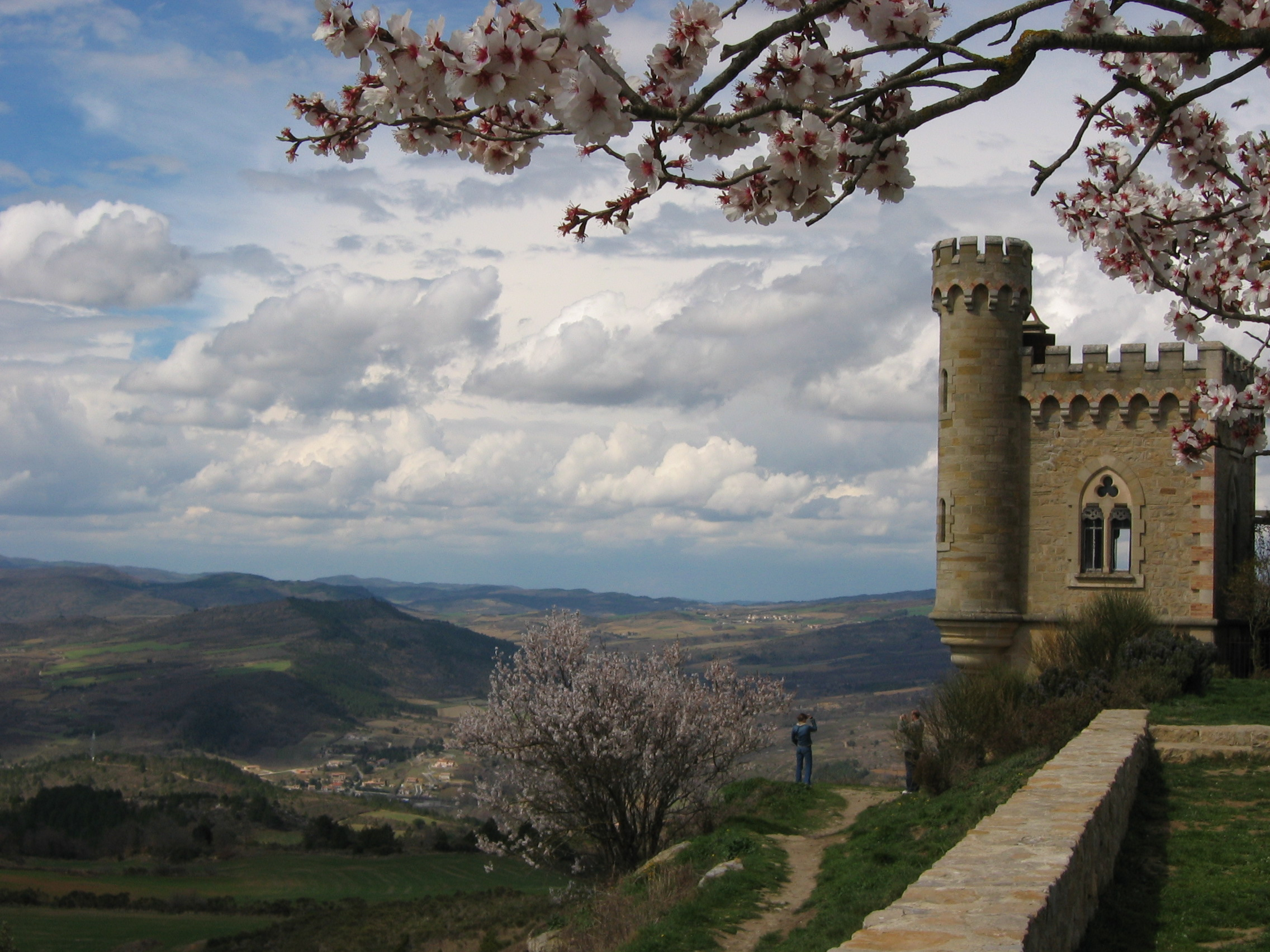 Autor:Chosovi